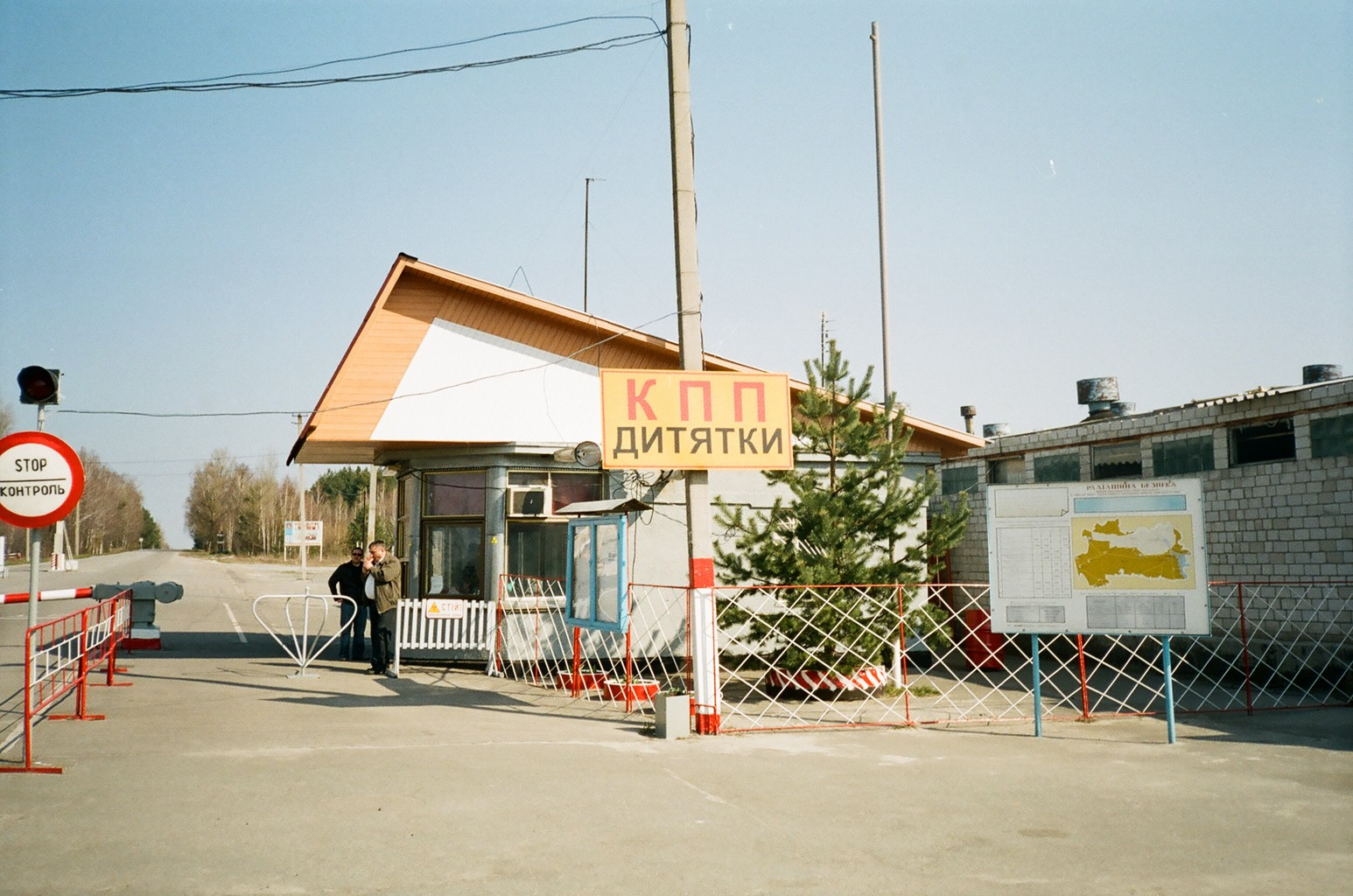 Ellenőrzőpont Dityatkinál (Ukrajna)